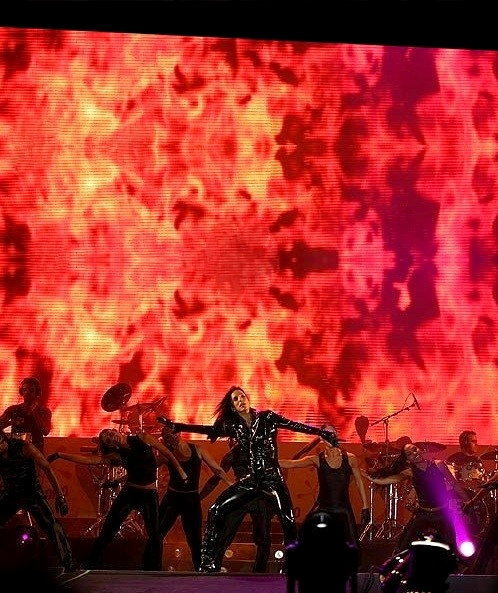 Foto de meu arquivo pessoal de shows de Ivete Sangalo. Ivete em 2007 em Natal.